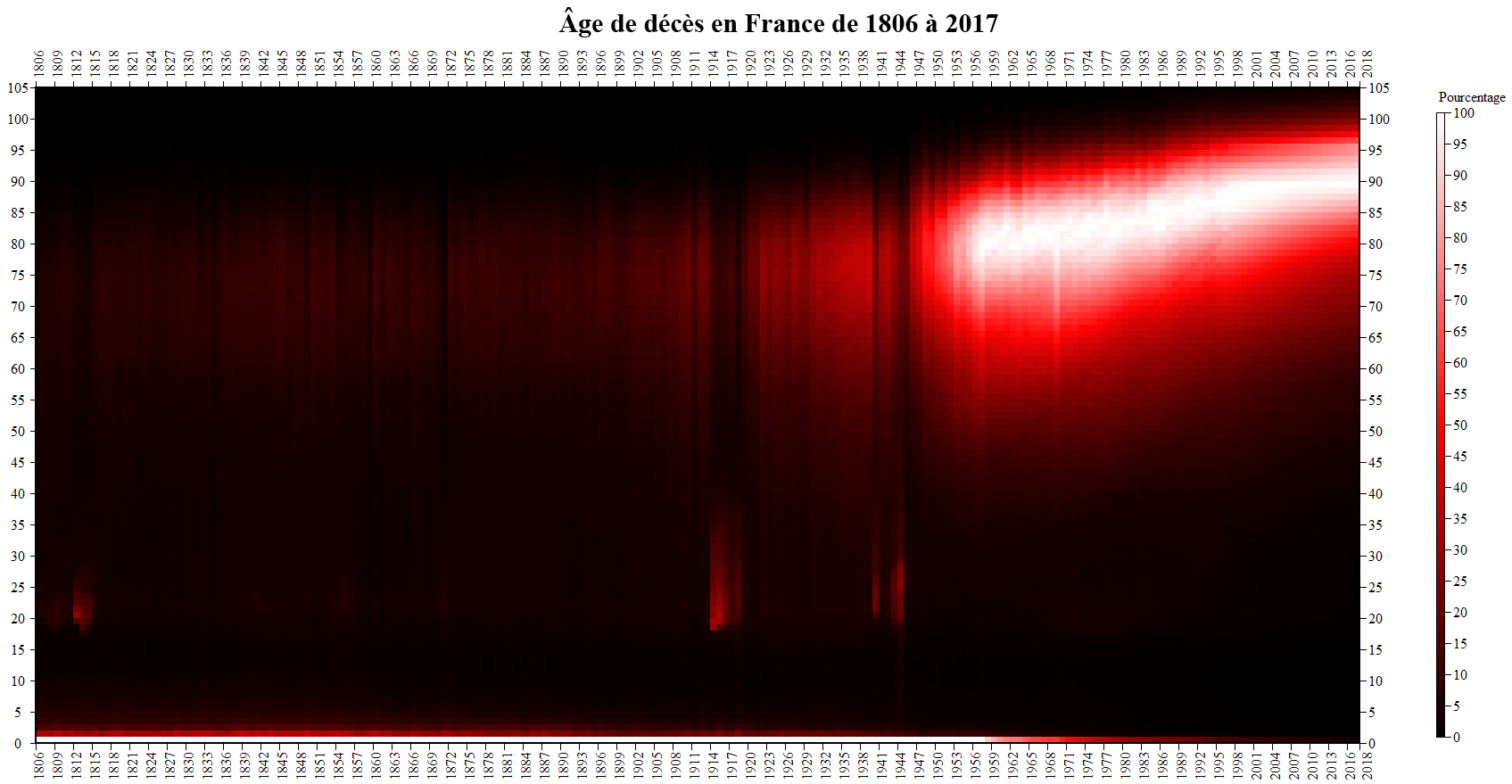 Évolution d'âge de décès en France de 1806 à 2017 (Source: INED) Pourcentage du nombre de décès de l'âge avec le plus important taux de décès. Légende: Pourcentage du maximum de morts d'une année en fonction de l'âge. (ex: en 2017, le plus fort tôt de mortalité était pour les 89 ans, 4 607 morts sur 100 000; 4 607 morts = 100%, pour les 70 ans, il y a 1 140 morts sur 100 000, soit 24,8% de 4 607 morts) Blanc = 100% du maximum de mort de l'année pour l'âge en abscisse. Rouge = 50% du maximum de mort l'année pour l'âge en abscisse. Noir = 0% du maximum de mort de l'année pour l'âge en abscisse.